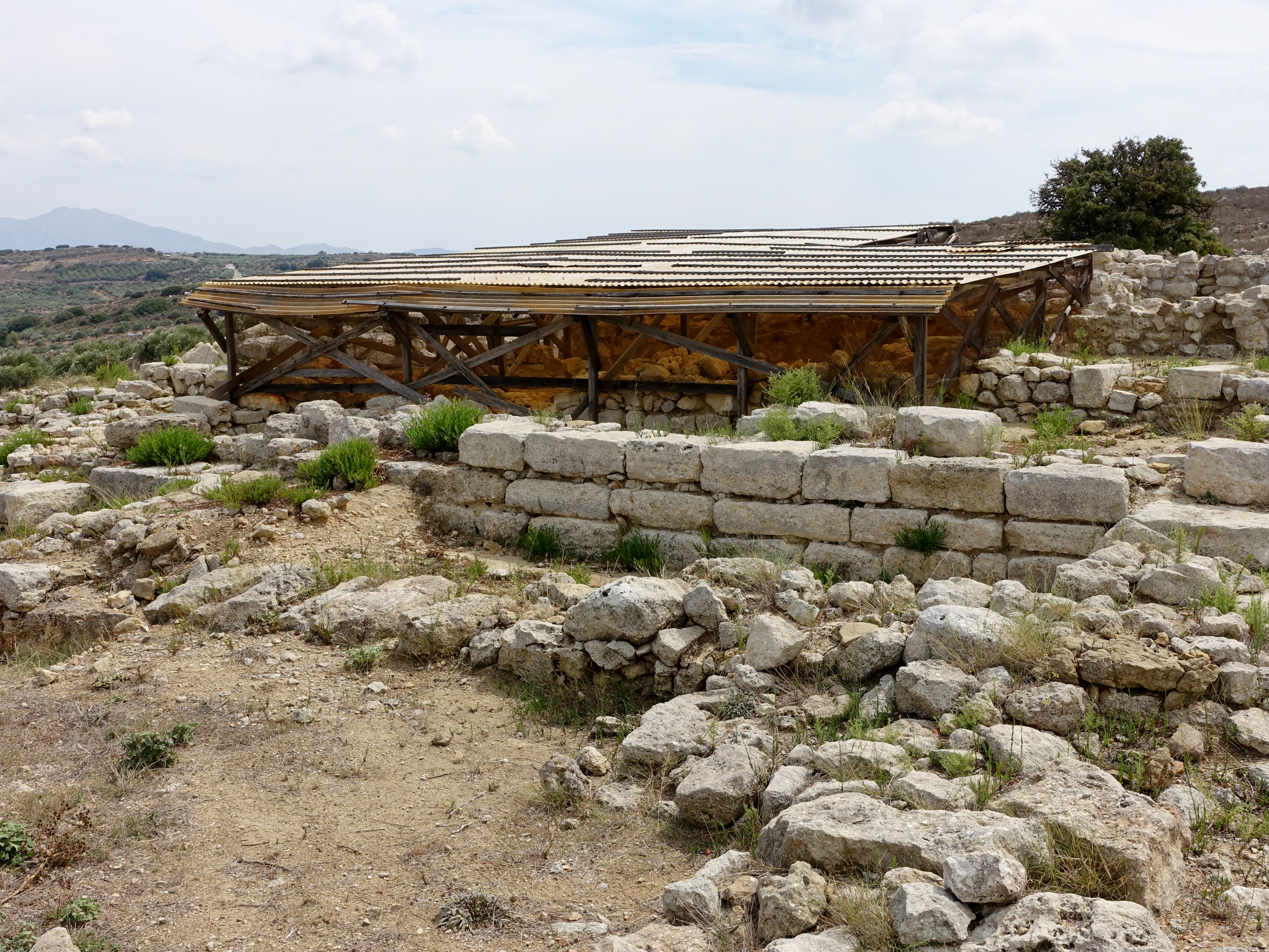 Palast von Galatas (Μινωικό Ανάκτορο του Γαλατά) nordwestlich von Arkalochori (Αρκαλοχώρι), Gemeinde Minoa Pediada, Kreta, Griechenland